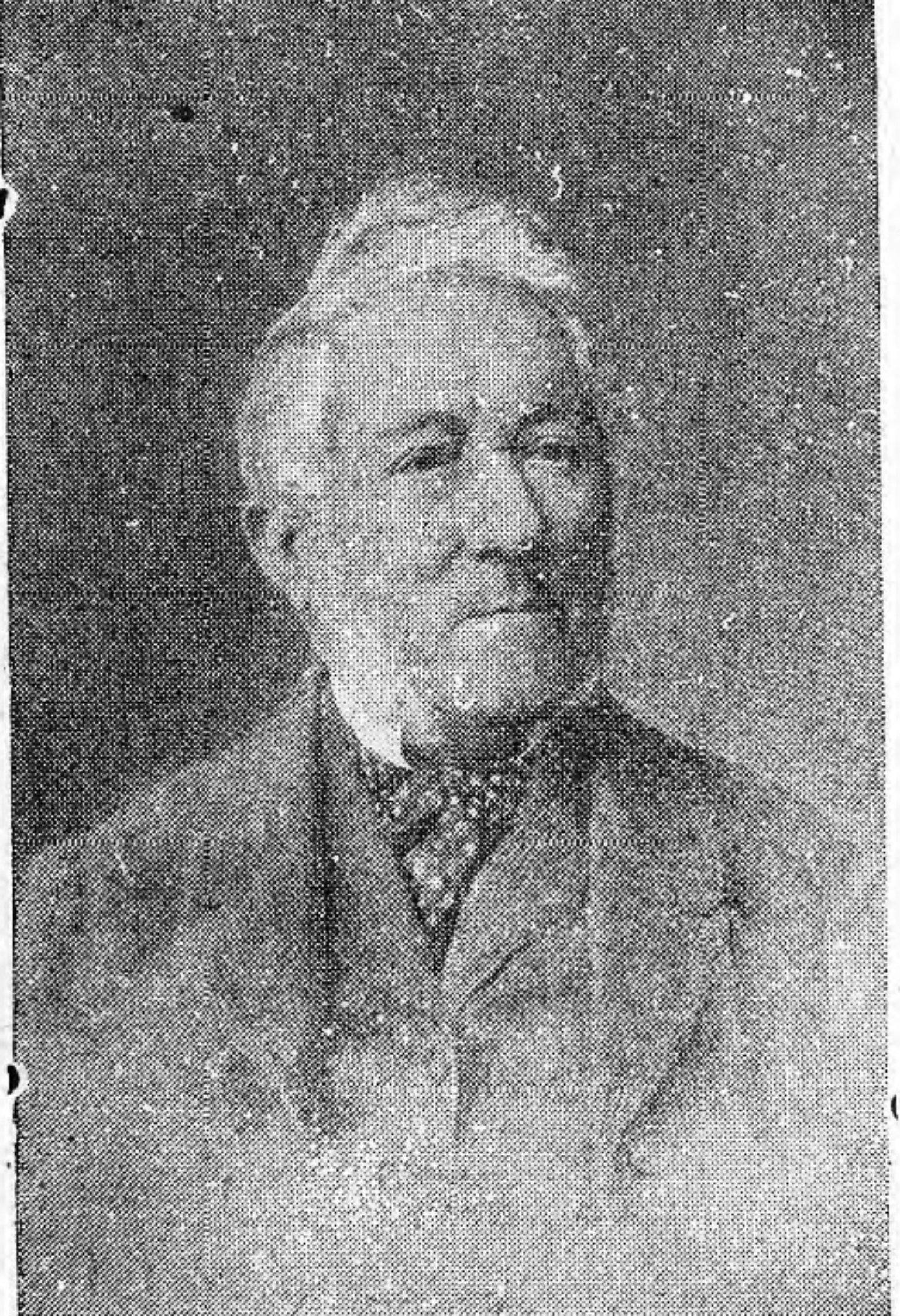 Nicholas Bennett (1823 -1899) cerddor a hanesydd